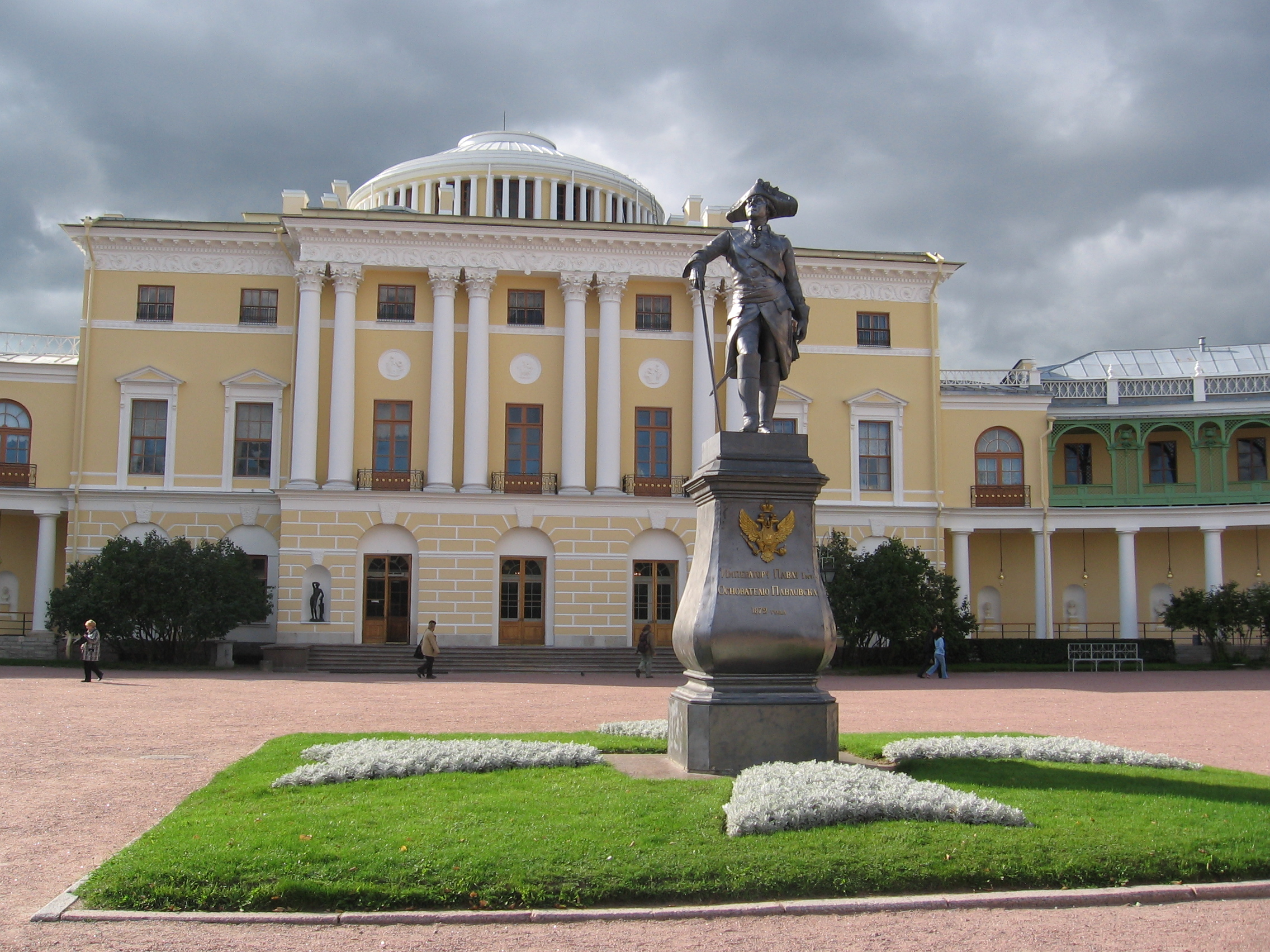 Фото